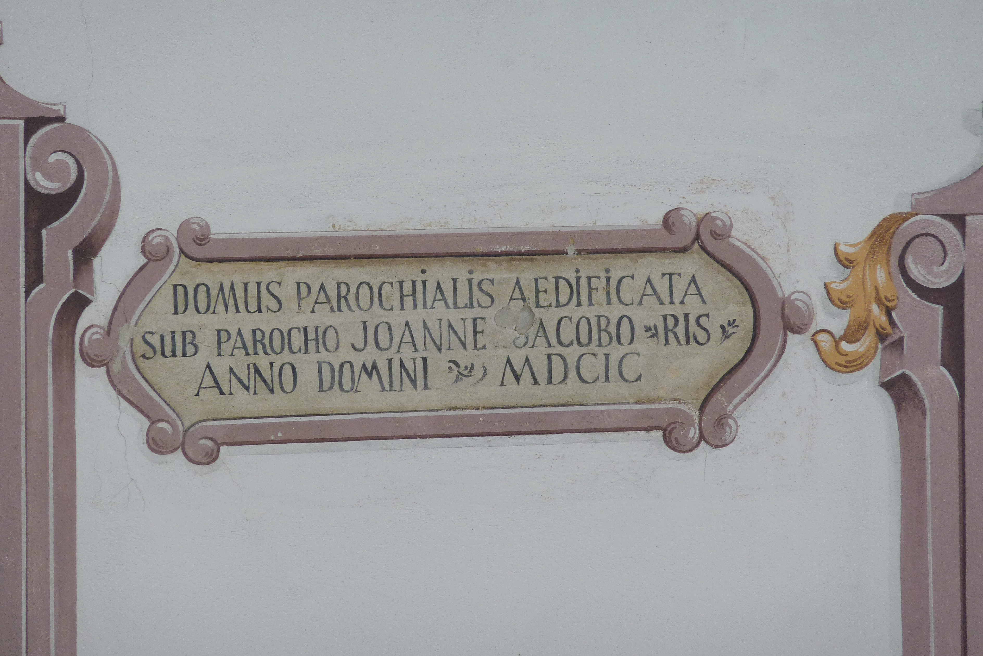 Pfarrhaus in Waldkirch, einem Ortsteil von Winterbach (Schwaben) im Landkreis Günzburg (Bayern), von 1699; Tafel mit Inschrift: DOMUS PAROCHIALIS AEDIFICATA SUB PAROCHO JOANNE JACOBO RIS ANNO DOMINI MDCIC (das Pfarrhaus wurde gebaut unter dem Pfarrer Johann Jakob Ris im Jahr des Herrn 1699)